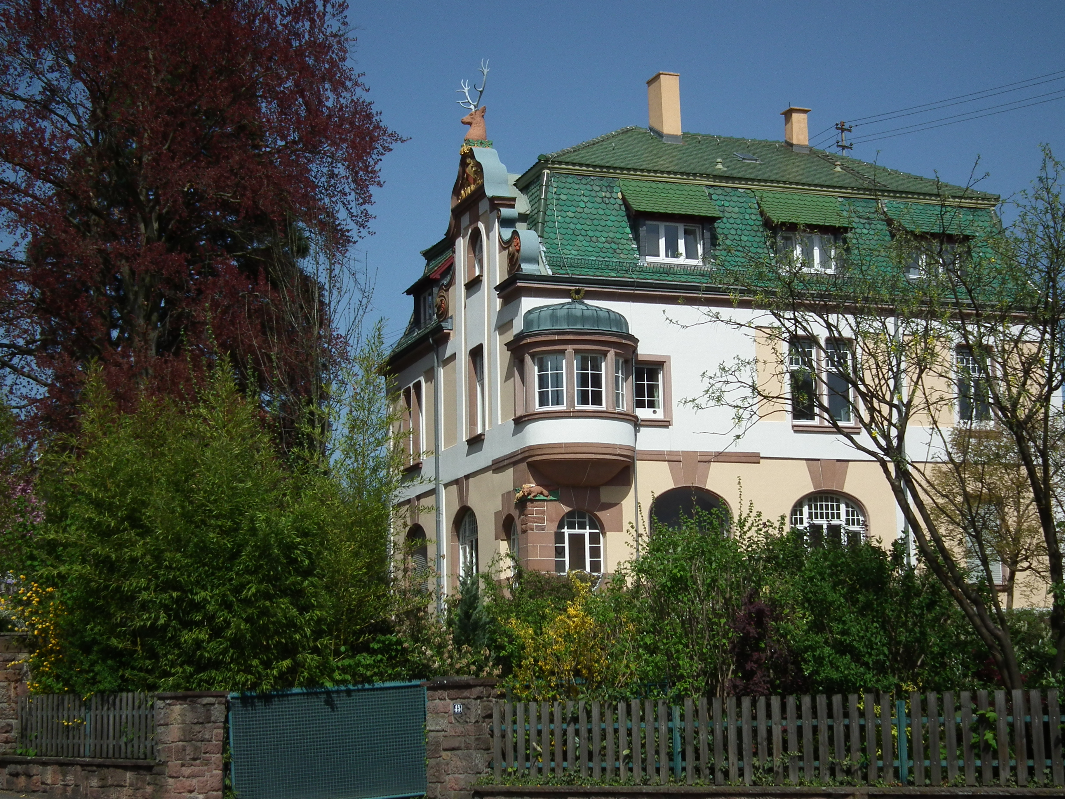 Forsthaus in Wiesloch (Baden-Württemberg, Deutschland)